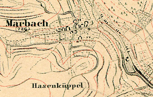 Topografische Karte von Marbach bei Marburg (1:25000).